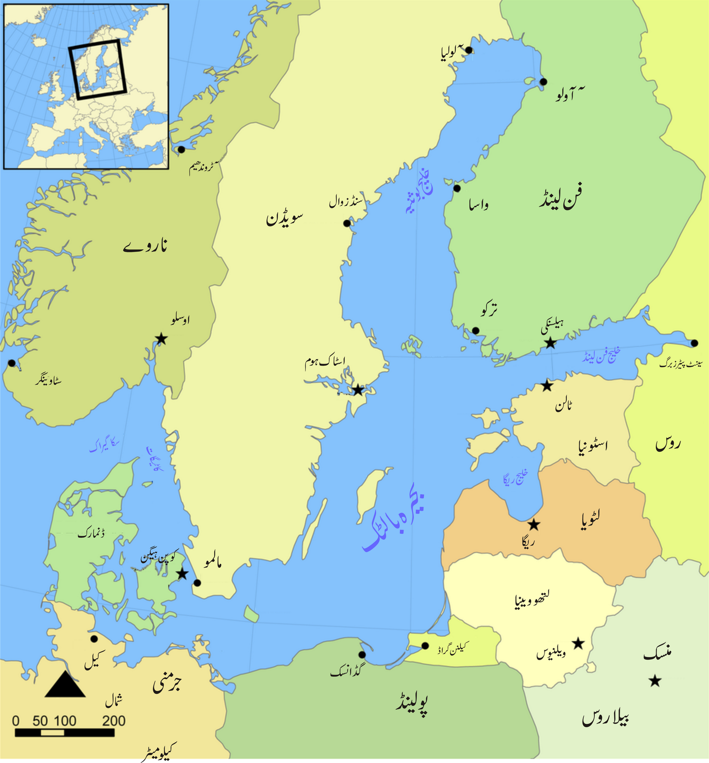 بحیرہ بالٹک